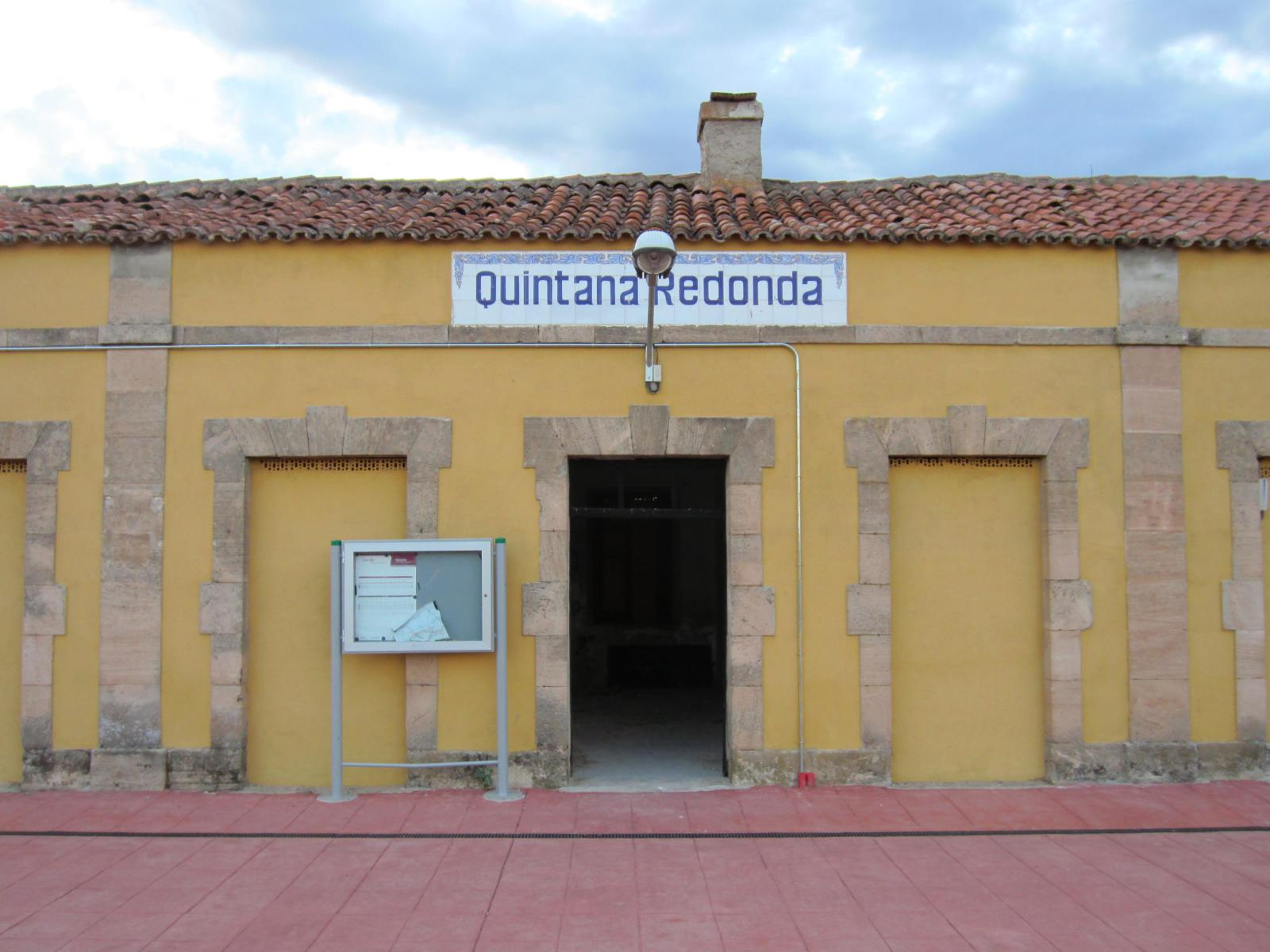 Estación de Quintana Redonda